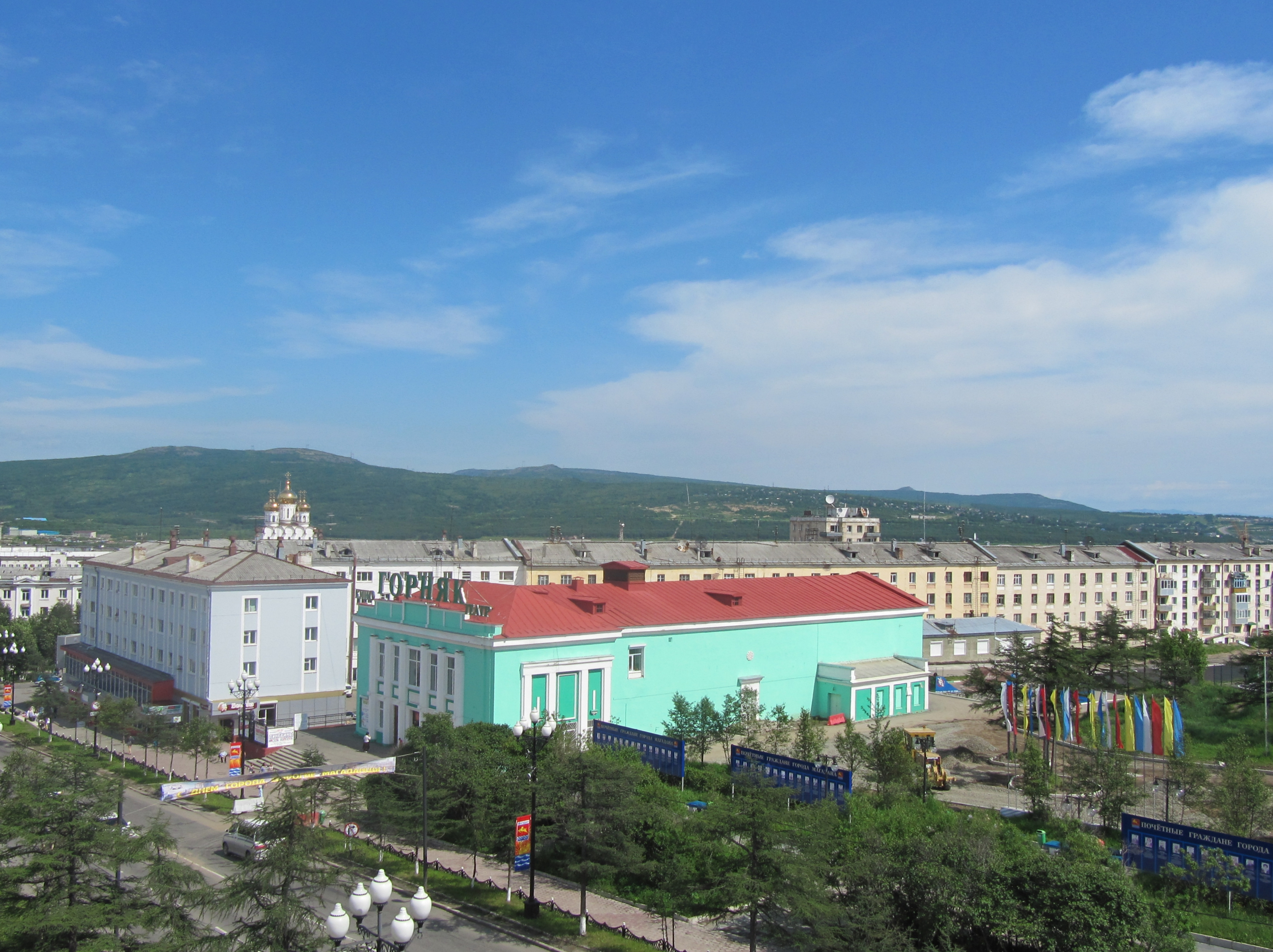 Magadan